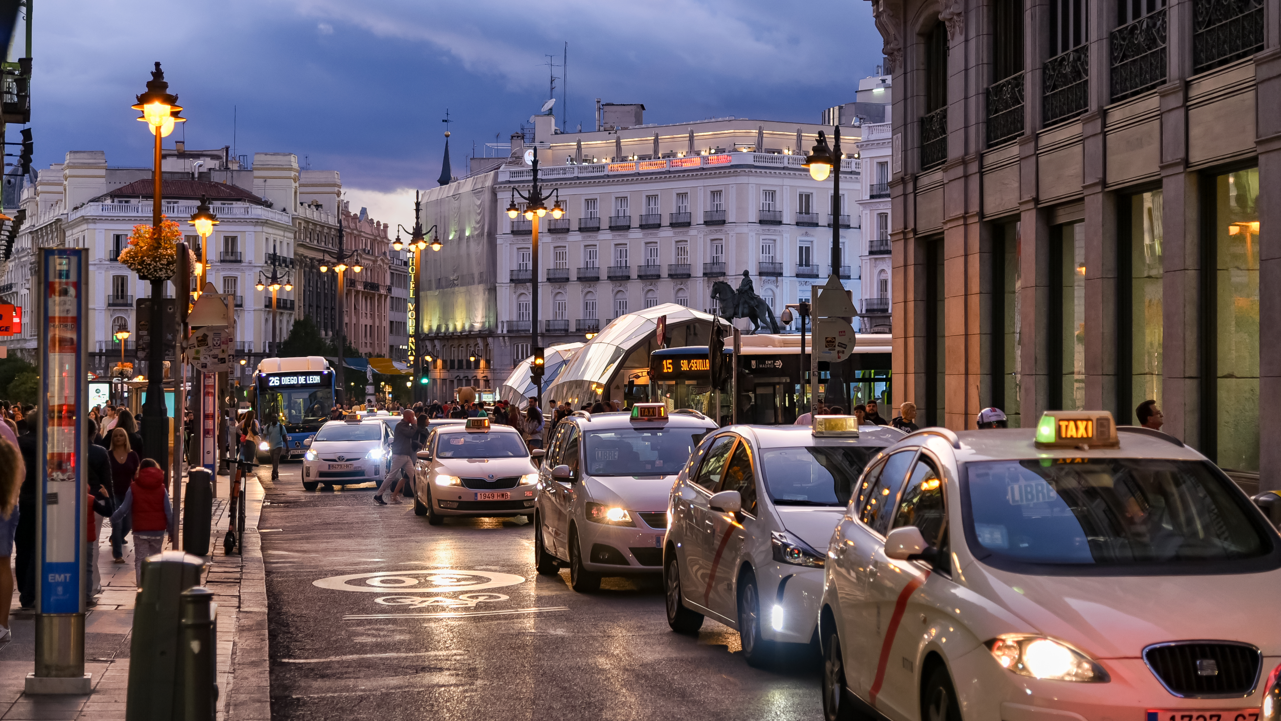 Carrera de San Jerónimo y Puerta del Sol, en Madrid (España).